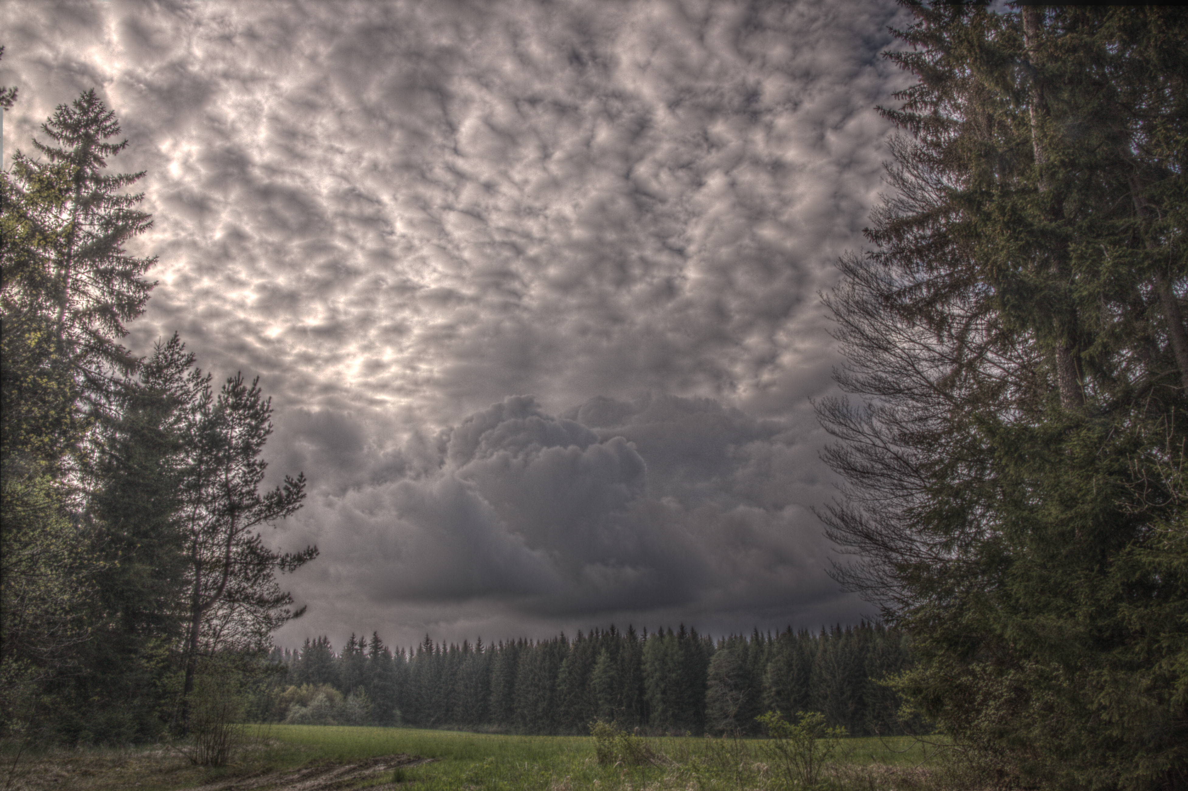 HDR Bild aus Luminance HDR (Mantiuk 06). Die Quellbilder wurden ohne Stativ aufgenommen.